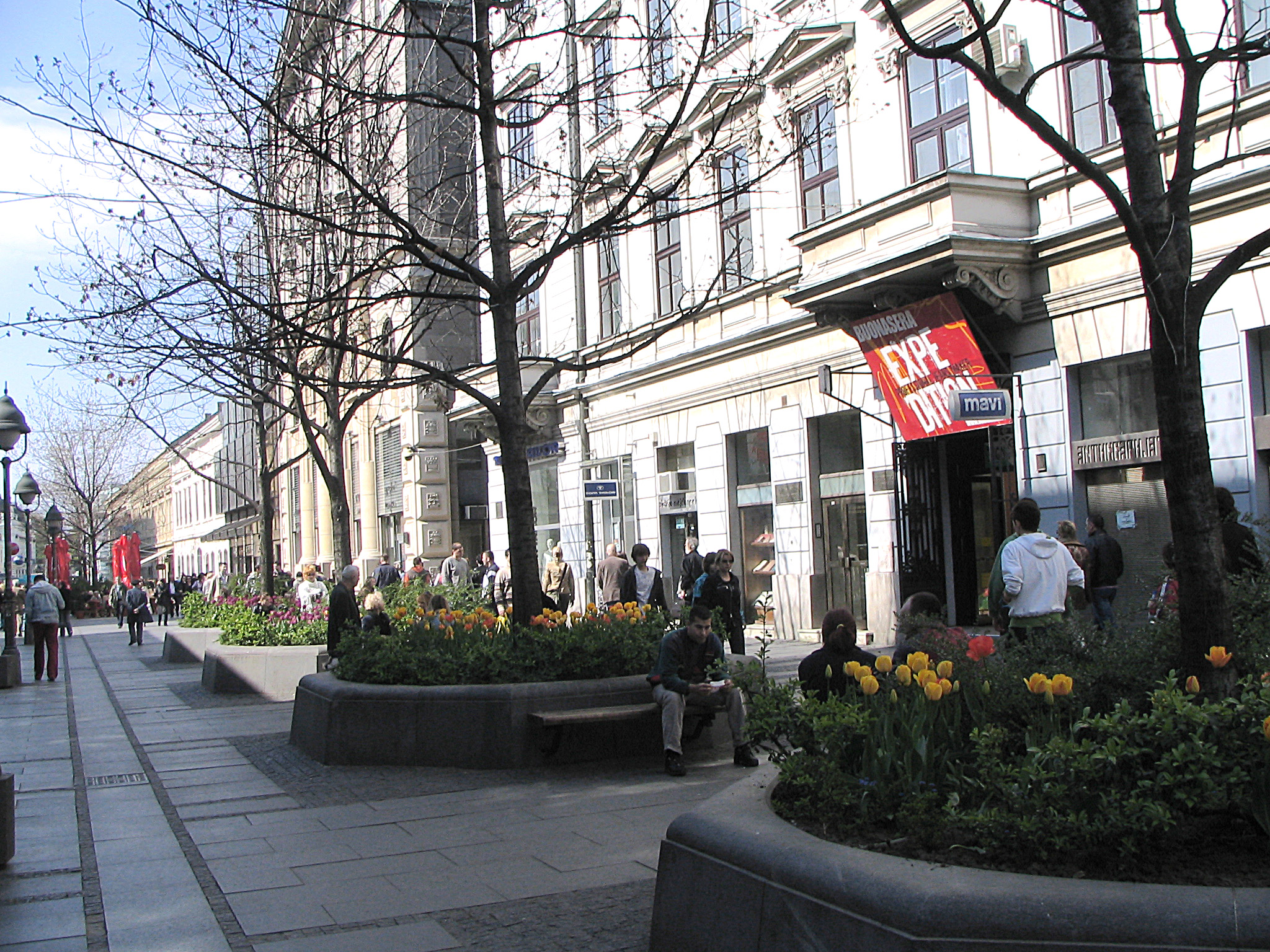 Црвени храст у Кнез Михаиловој (аутор: Михаило Грбић, 6. април 2007.)